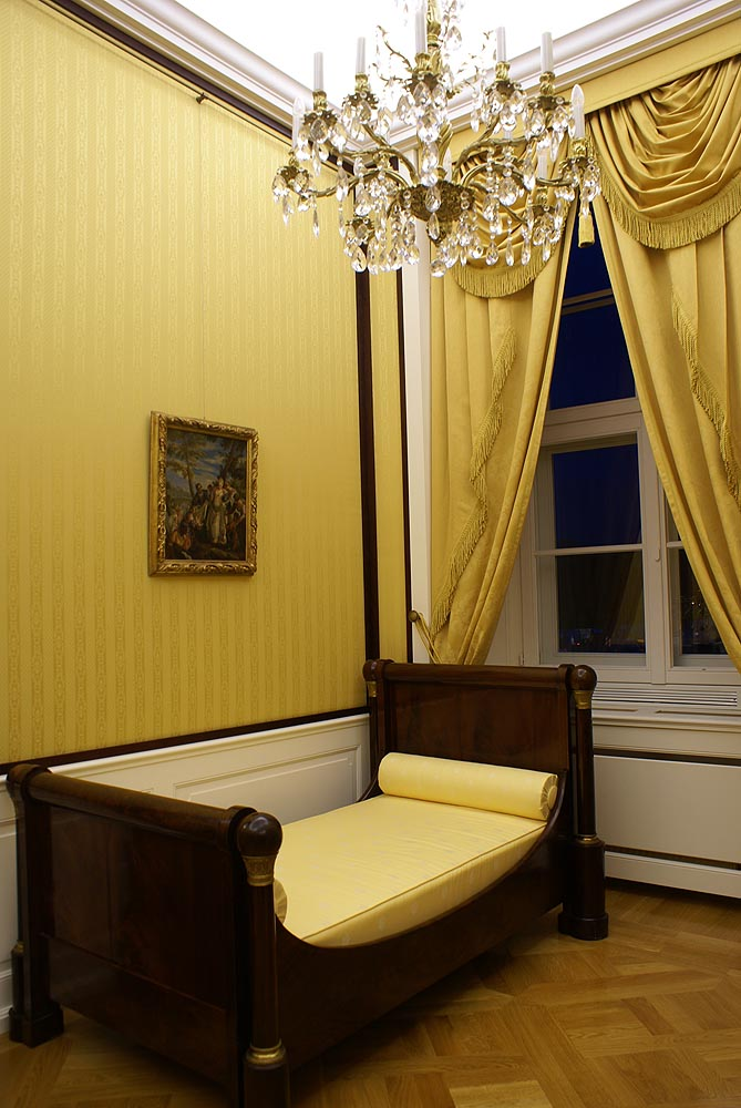 Wrocław Stare Miasto, Kazimierza Wielkiego 35 (33) - dawny Pałac Spaetgenów, potem Pałac Królewski (zabytek nr A/5268/60)